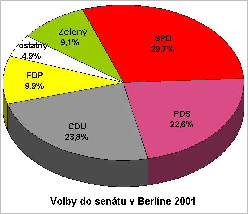 Voľby v Berlíne, rok 2001, zdroj: CS Wiki, prelozil som tam par drobnosti do SK Kategória:Obrázky schém Kategória:Slovenský popis v obrázku